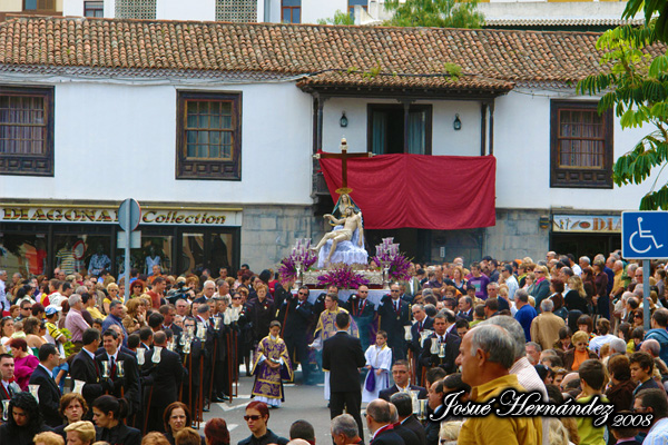 El Santísimo Cristo del Calvario a su paso por el Llano de San Sebastián. Semana Santa de la Villa de La Orotava